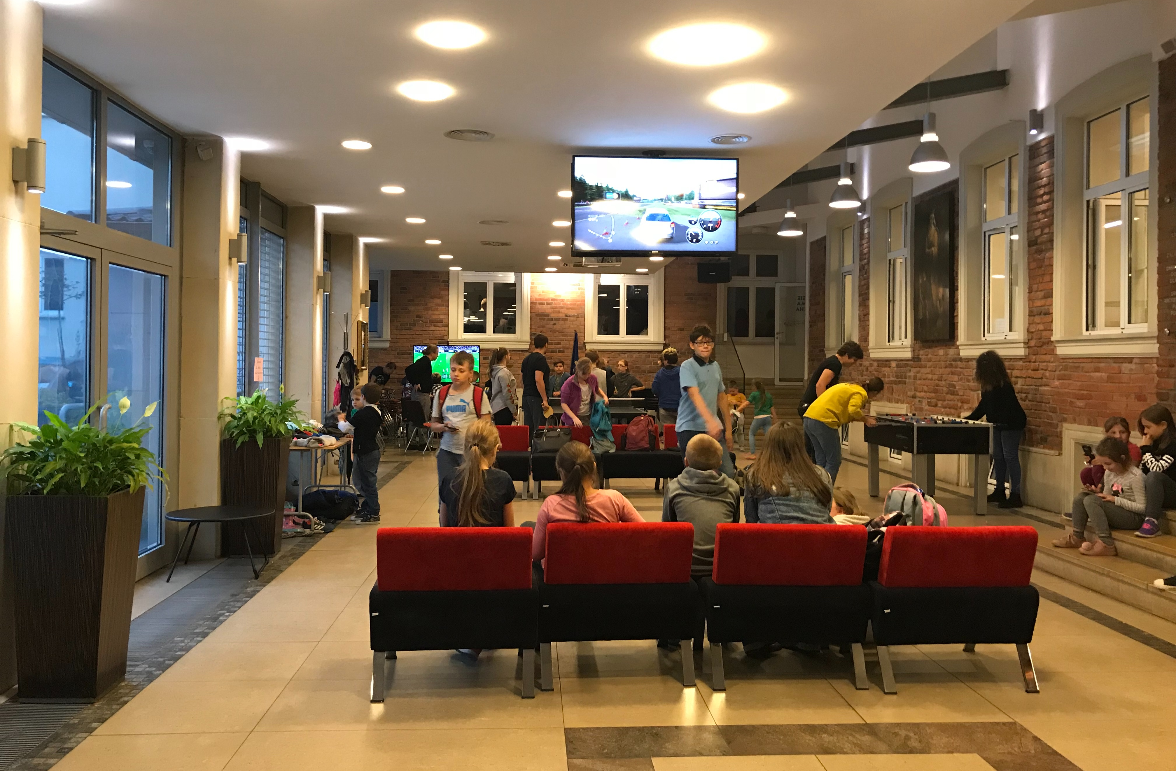 Aula w SIEMACHA Spot na ul. Długiej 42 w Krakowie wybudiwana w 2008 służy do irganizacji wydarzeń i cidziennych zajęć z dziećmi, wrzesień 2018.